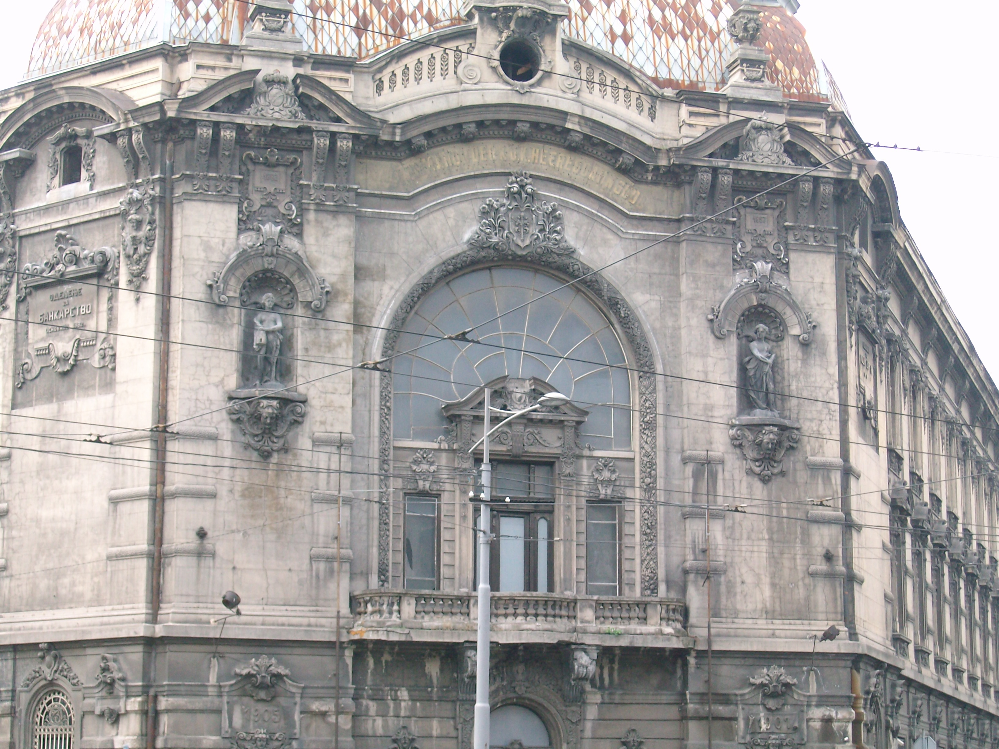 Тераса са великим стакленим порталом